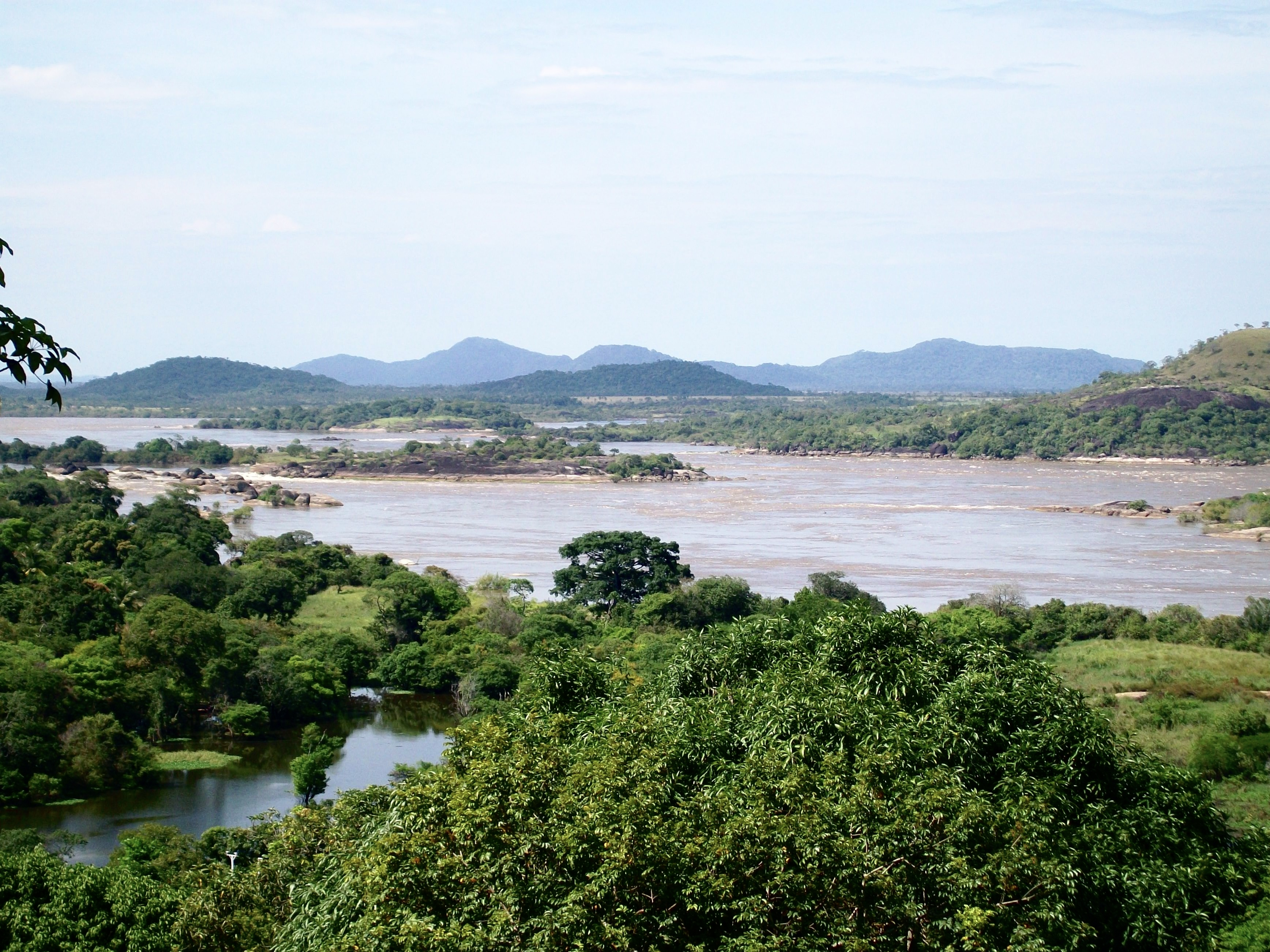 el rio orinoco visto desde el cerro perico decembocando en las orillas de la ciudad de pto ayacucho